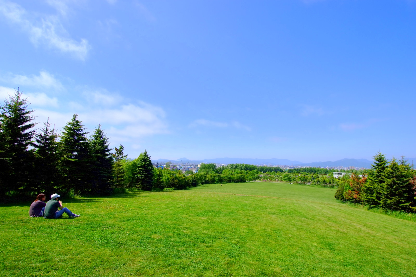 川下公園 （Kawashimo Park）